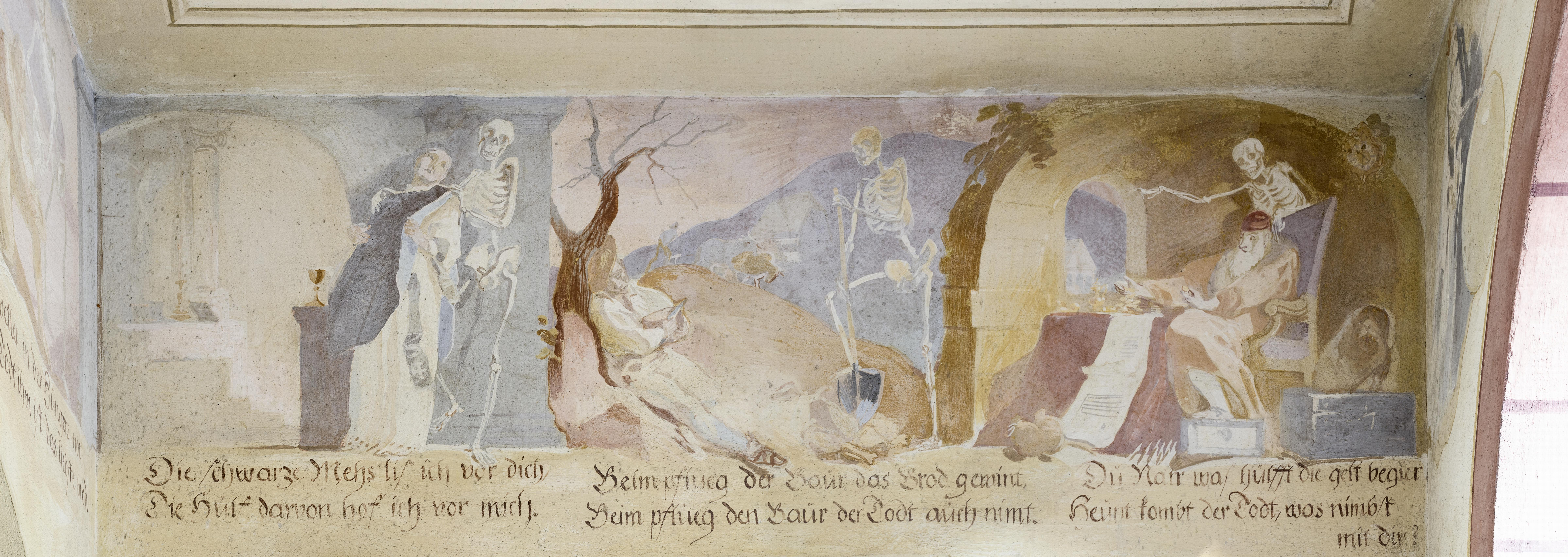 Der Totentanz in der Michaelskapelle auf dem Alten Friedhof in Freiburg im Breisgau nach der Restaurierung 2012 Der rechte Seite